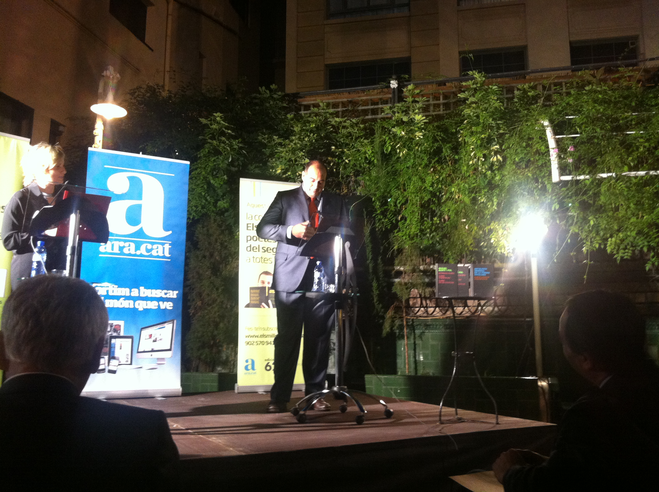 Diari Ara presentació els millors poetes catalans a l'ataneu Barcelonès